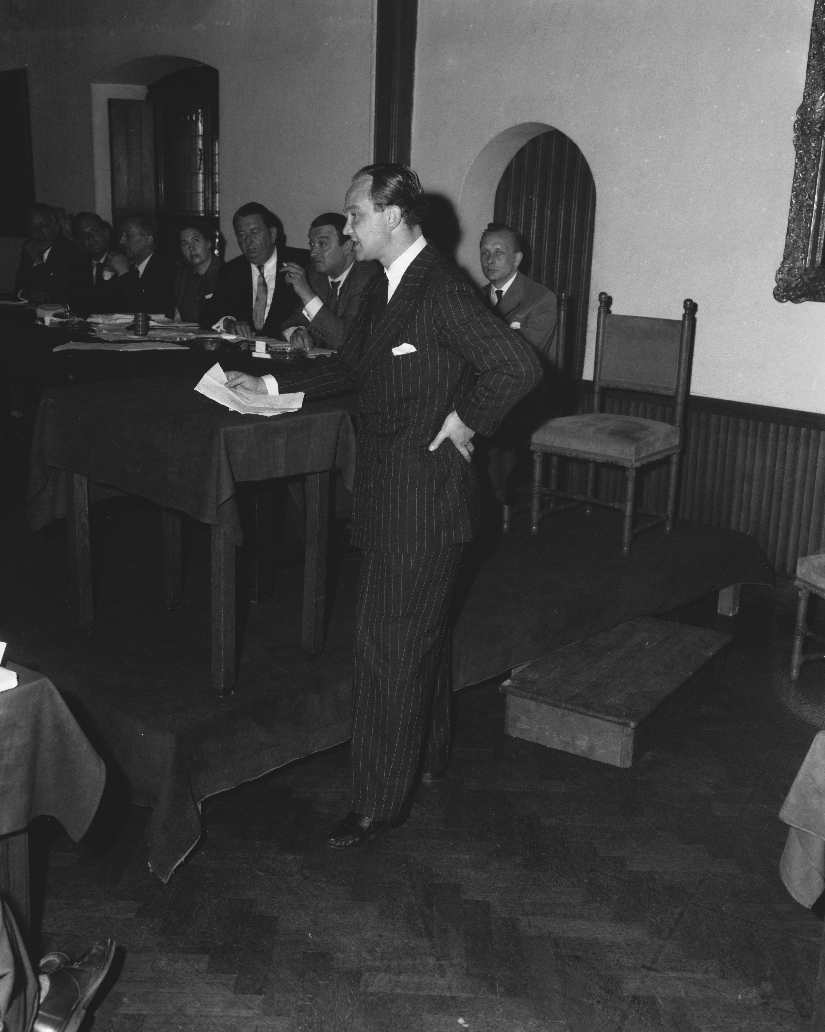 Collectie / Archief : Fotocollectie Anefo Reportage / Serie : Internationale Ruimtevaartcongres in Den Haag Beschrijving : Toespraak van internationaal jurist dr. Prins Wolf Heinrich van Hannover (Duitse delegatie). Datum : 29 augustus 1958 Locatie : Den Haag, Zuid-Holland Trefwoorden : congressen, delegaties, juristen, ruimtevaart Persoonsnaam : Hannover, prins Wolf Heinrich van Fotograaf : Behrens, Herbert / Anefo Auteursrechthebbende : Nationaal Archief Materiaalsoort : Negatief (zwart/wit) Nummer archiefinventaris : bekijk toegang 2.24.01.04 Bestanddeelnummer : 909-8084